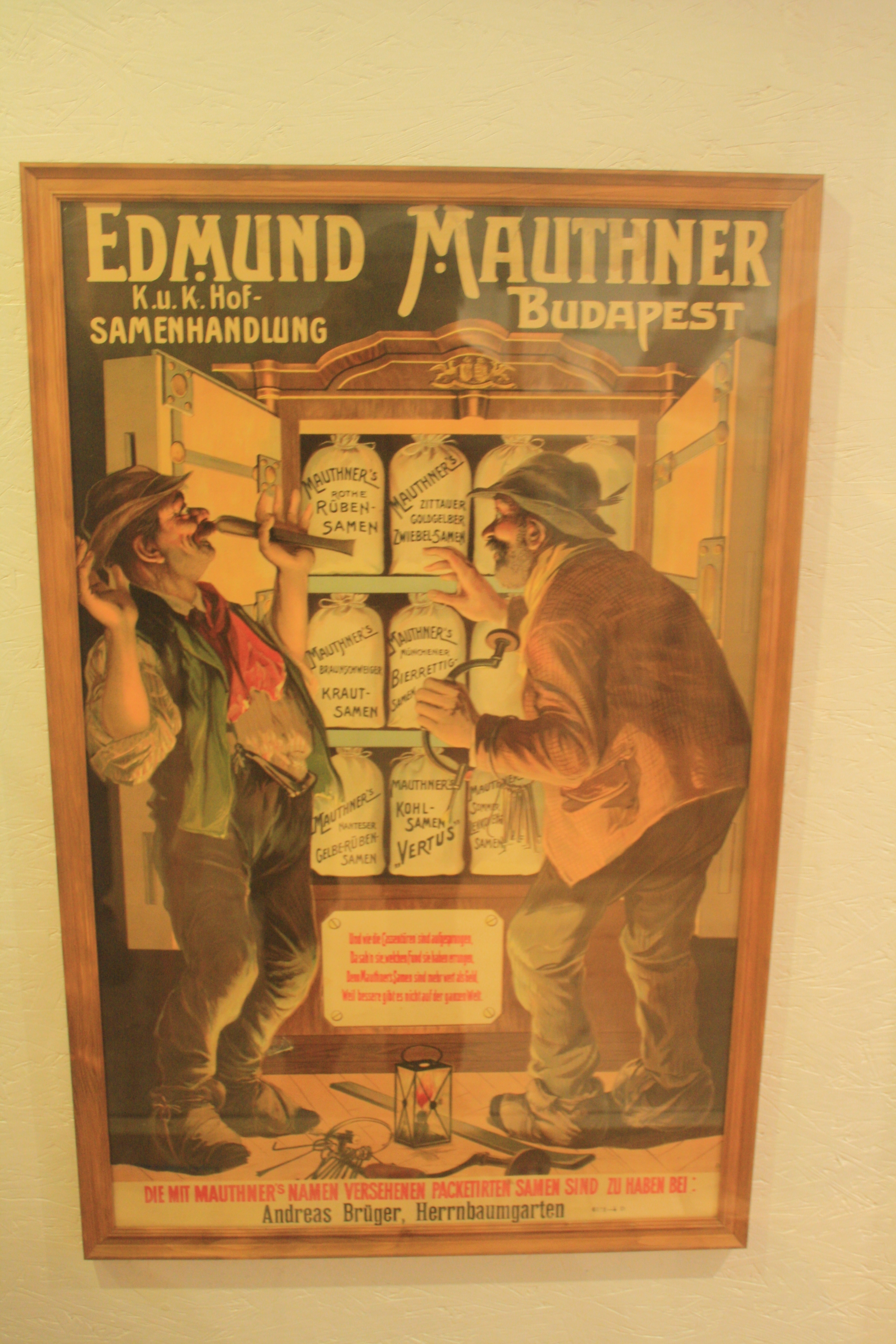 Altes Werbeplakat des k.u.k. Hoflieferanten Edmund Mauthner im Küchenmuseum in Herrnbaumgarten, Niederösterreich. Plakat vor 1918 erstanden.